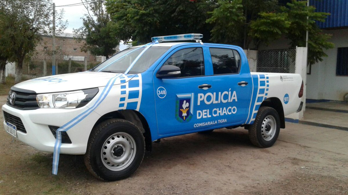 Patrullero de la policía chaqueña